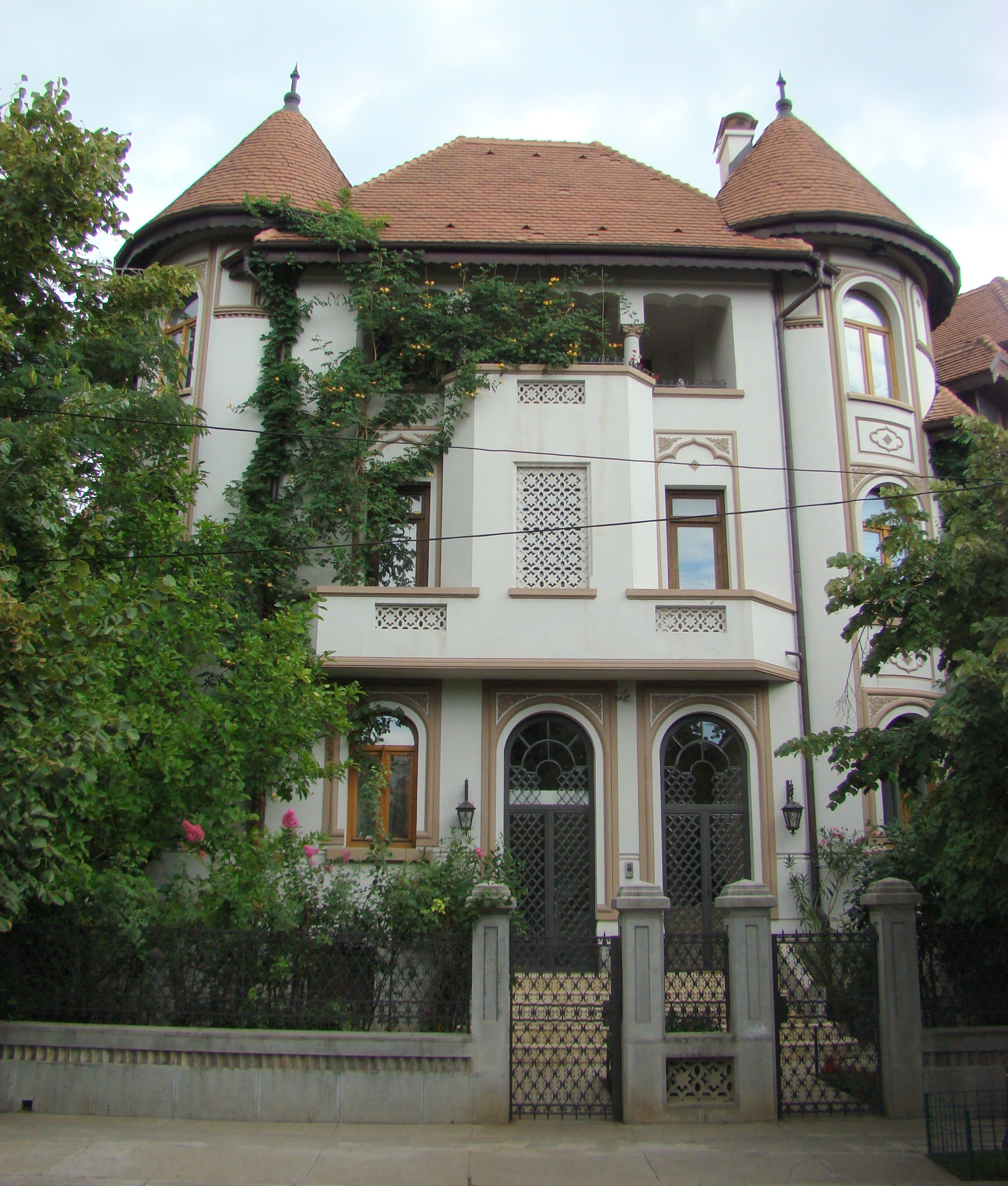 Casă monument istoric, str.Londra, nr.48